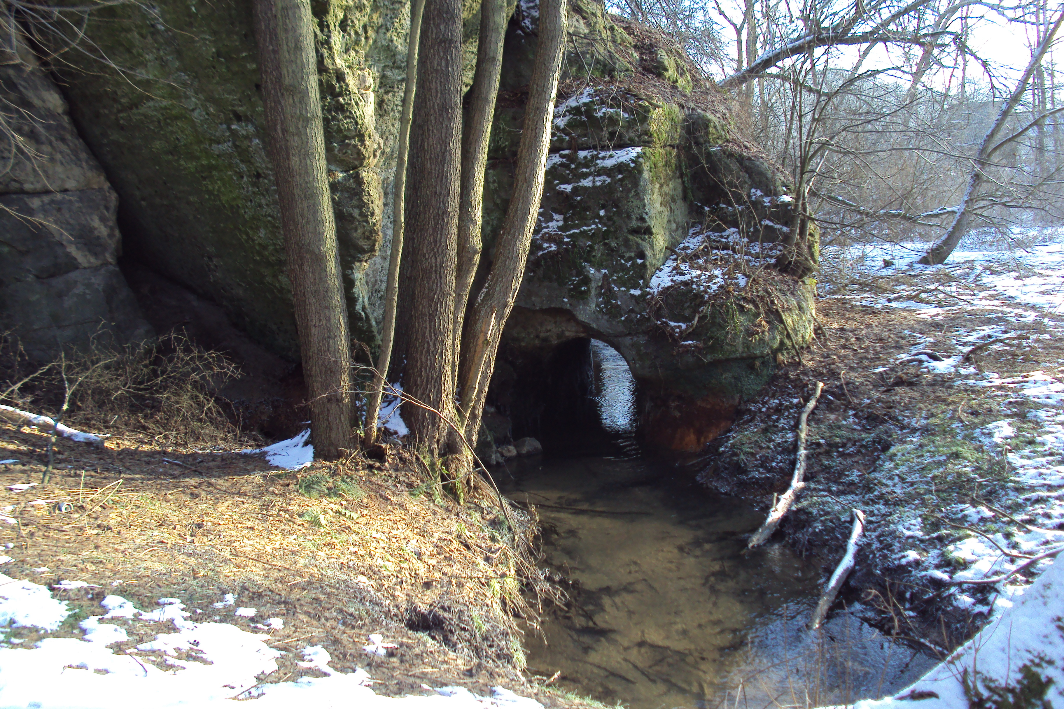 Potok Liběchovka na Kokořínsku, obec Rozprechtice u Dubé